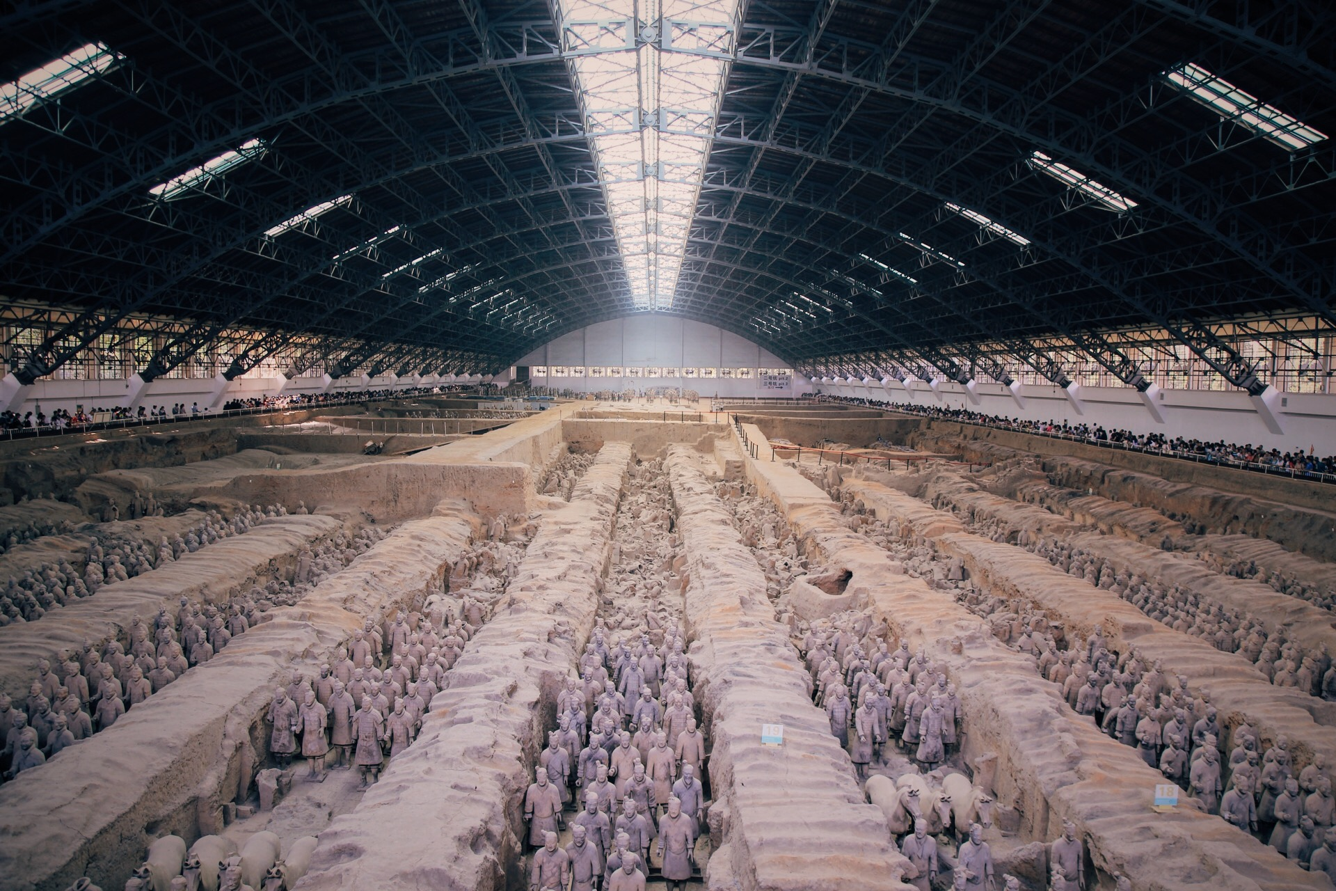 秦始皇陵兵馬俑一號坑展廳入內後中央拍攝